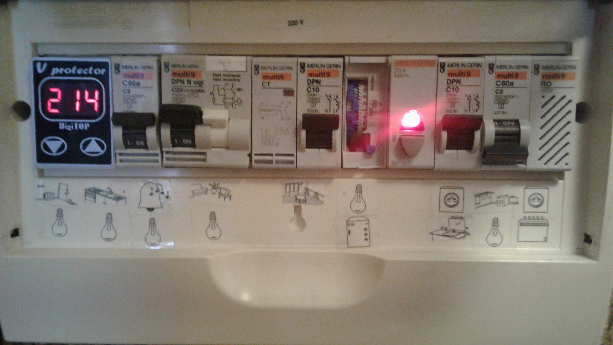 Робочий розподільний щит